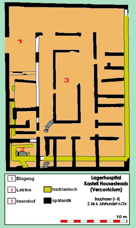 Befundplan Valetudinarium/Lagerhauptquartier des Kastells Housesteads (Vercovicium), Hadrianswall (GB).